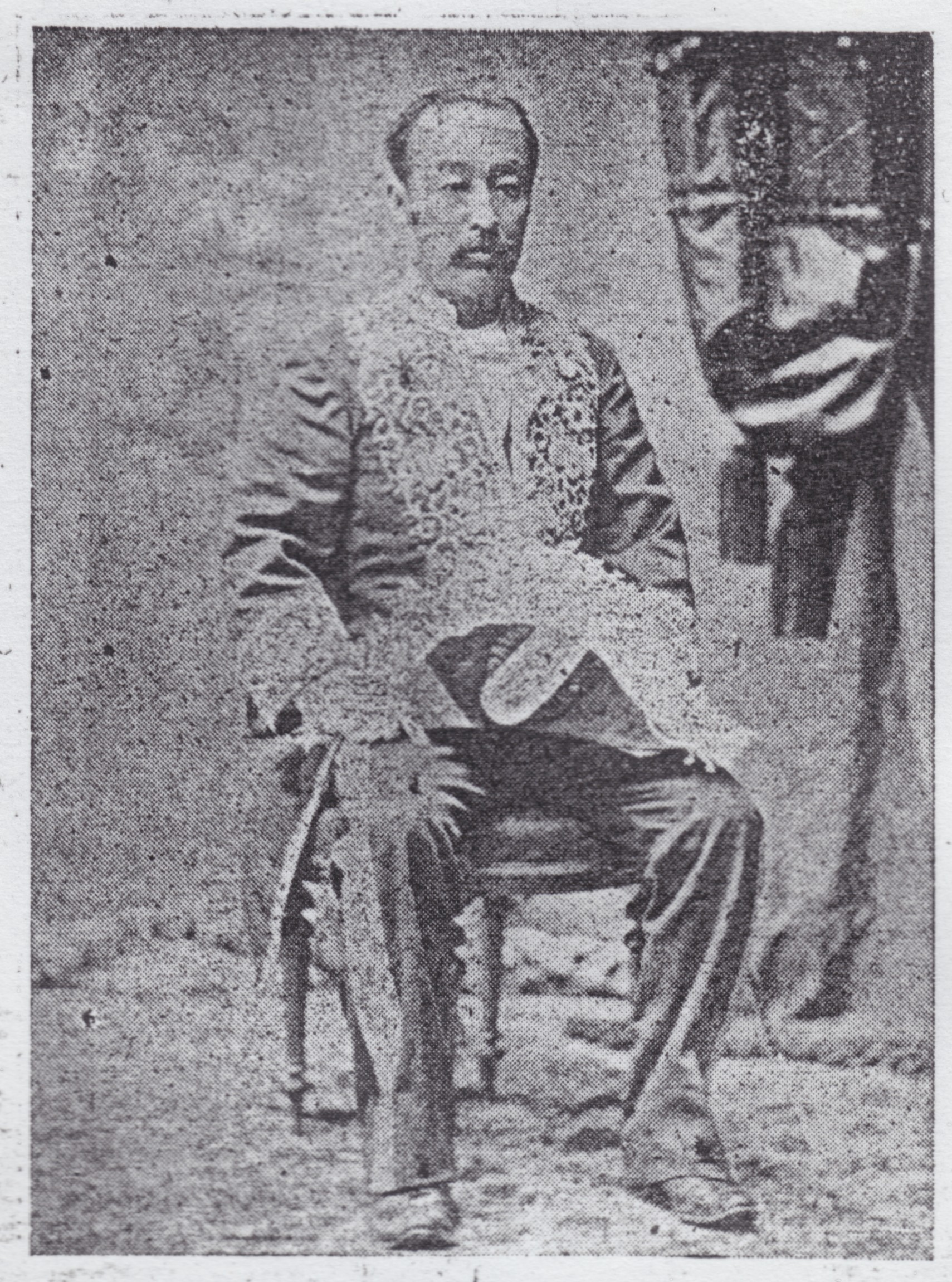 正四位四条隆平の写真